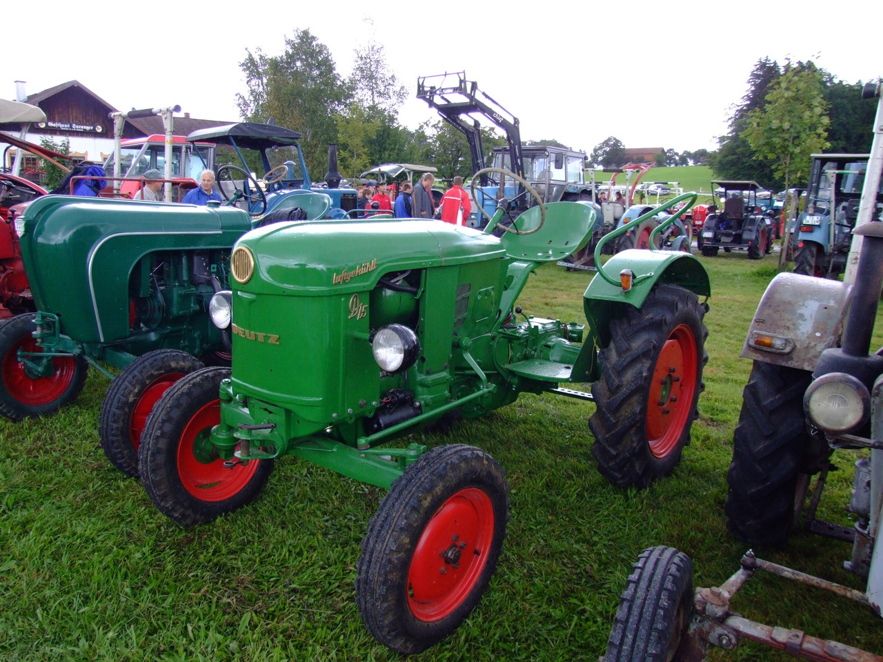 Deutz D15 luftgekühlt, Baujahr 1959